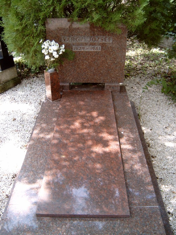 Varga József (rádiós, televíziós személyiség) sírja Budapesten. Farkasréti temető: 36/1-1-59.